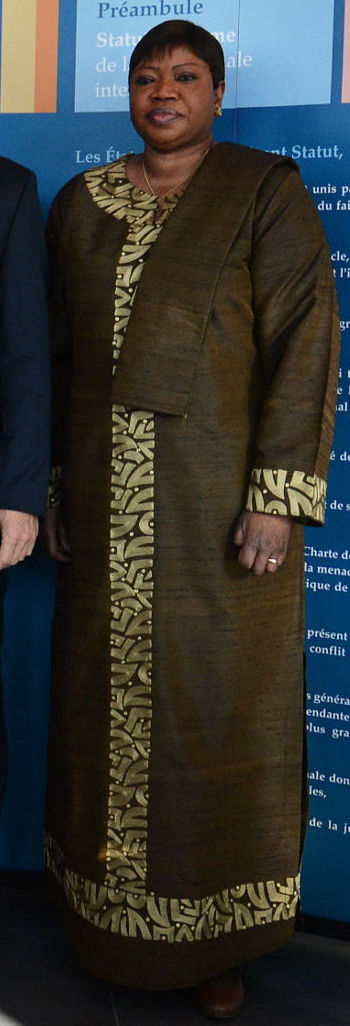 El presidente Mauricio Macri visitó a las autoridades de la Corte Penal Internacional (CPI) y reafirmó el pleno compromiso de la Argentina de defender los derechos humanos y condenar los delitos de lesa humanidad y todo tipo de violencia.